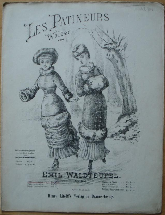 Titelblatt mit den Noten zum Walzer "Les Patineurs" (Op. 183 Schlittschuläuferwalzer) von Emile Waldteufel, Henry Litolffs Verlag in Braunschweig, ohne Jahr